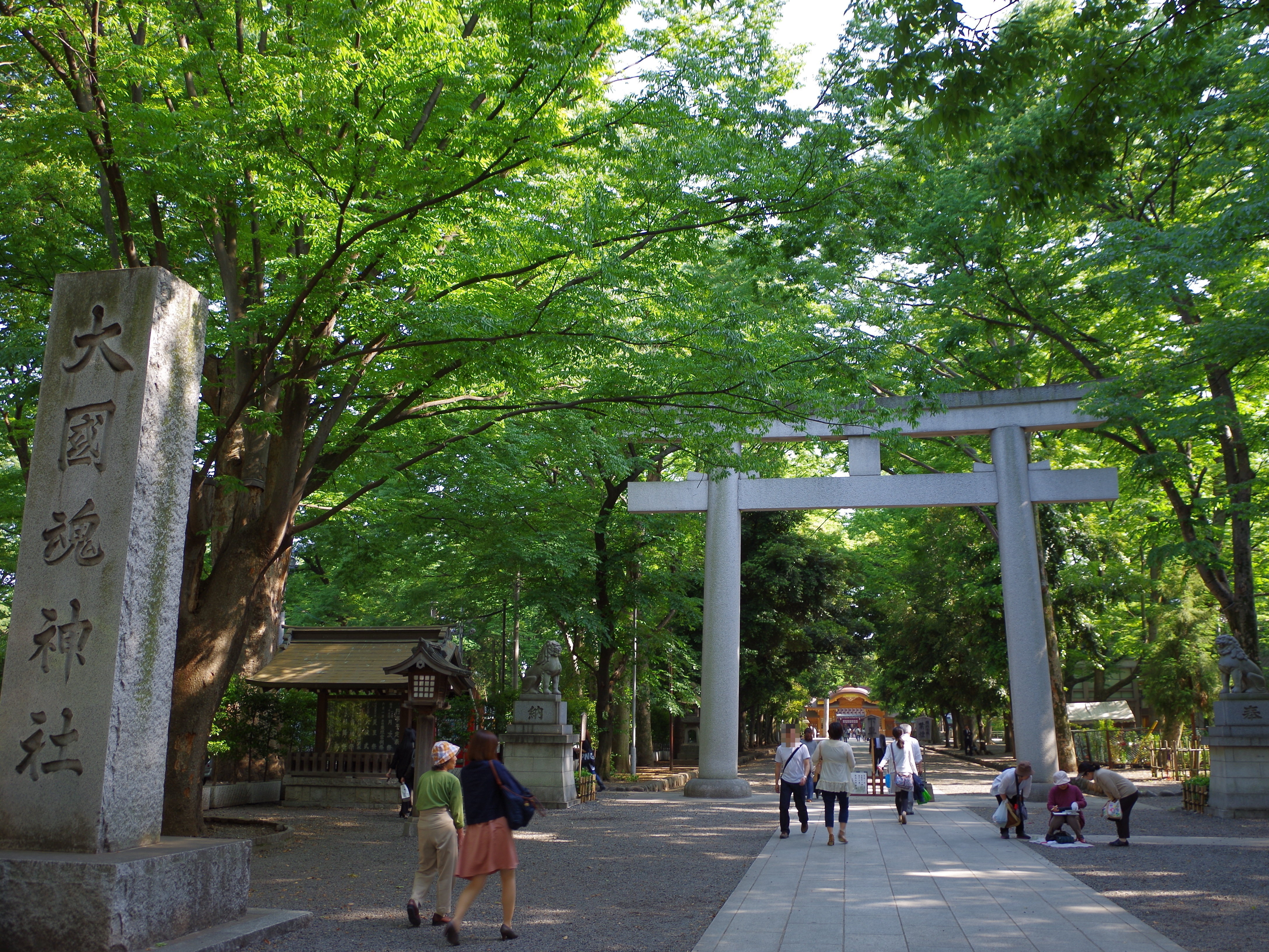 大國魂神社 東京都府中市 2013.5.17